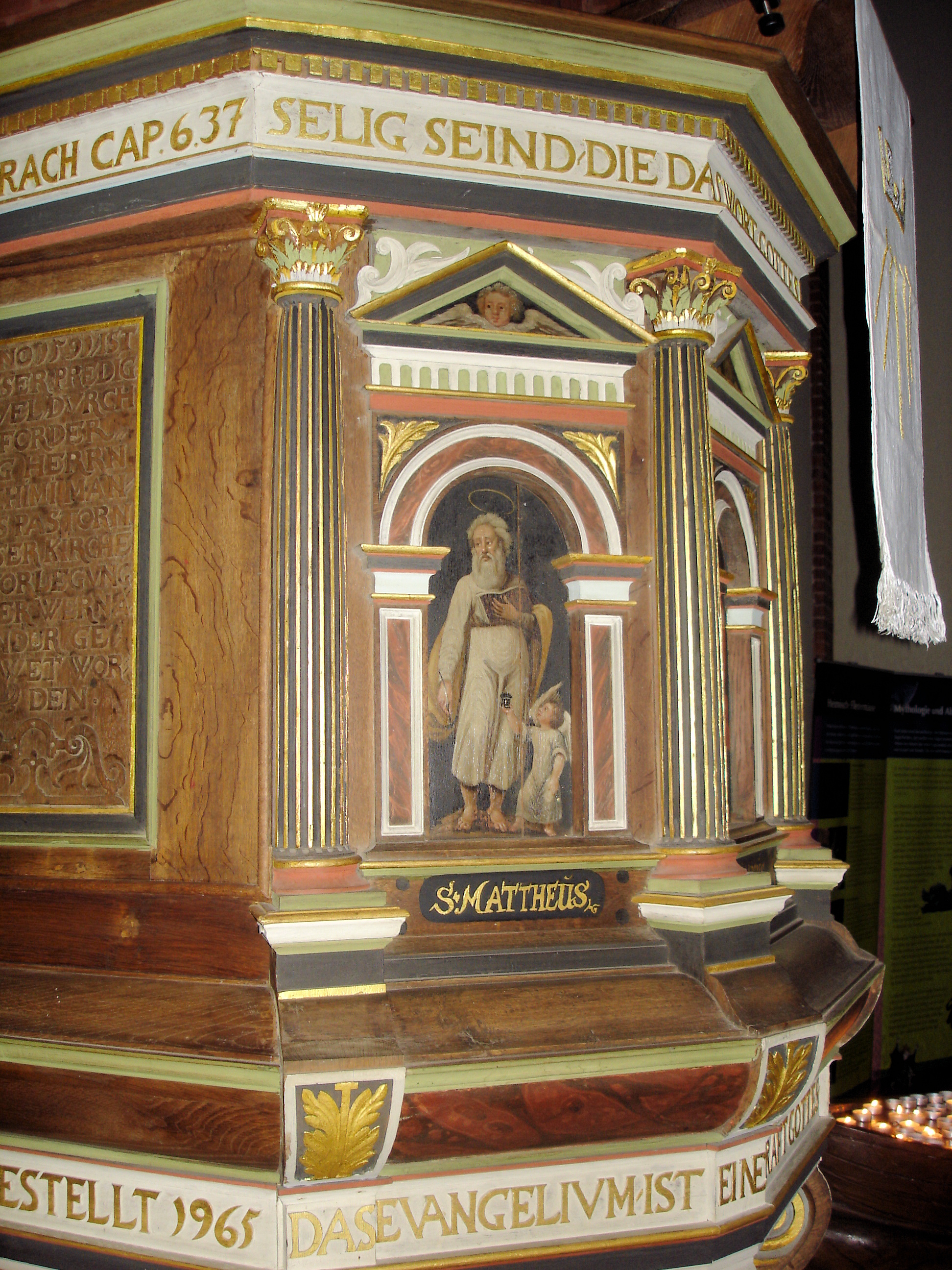 Kirche Warnemünde Kanzel Detail